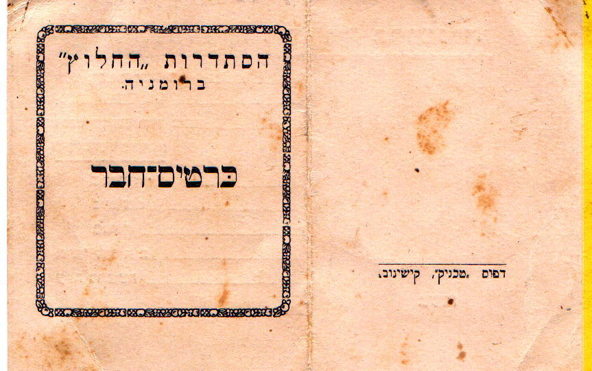 מדובר בסריקה של כרטיס חבר בתנועת "החלוץ" מראשית המאה העשרים.